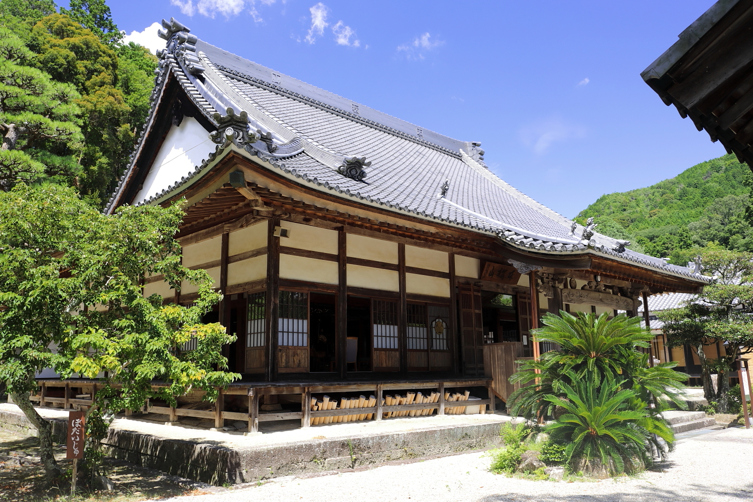 高月院本堂（豊田市松平町、2019年（令和元年）8月）